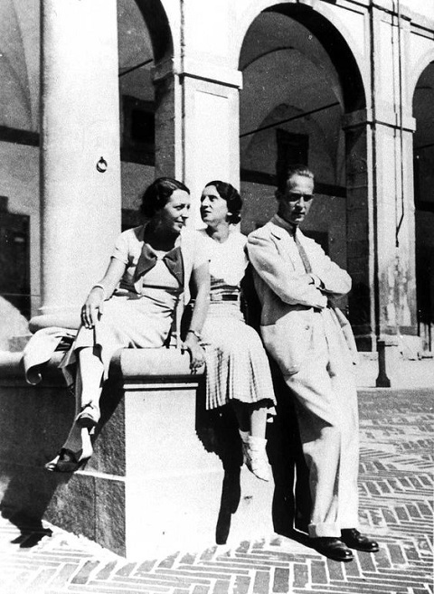 da destre, Franco Antonicelli, Marisa Zini e Anita Rho